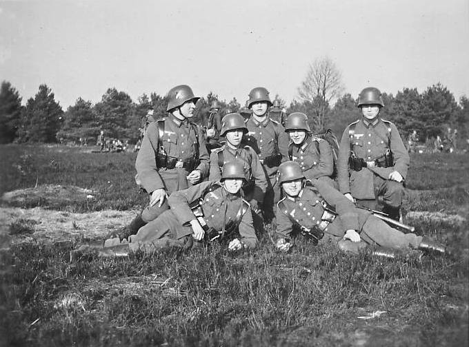 Gruppe von Soldaten der Wehrmacht 1937 im Heidekraut auf dem Truppenübungsplatz Sennelager. Weitere Soldaten lagern im Bildhintergrund.